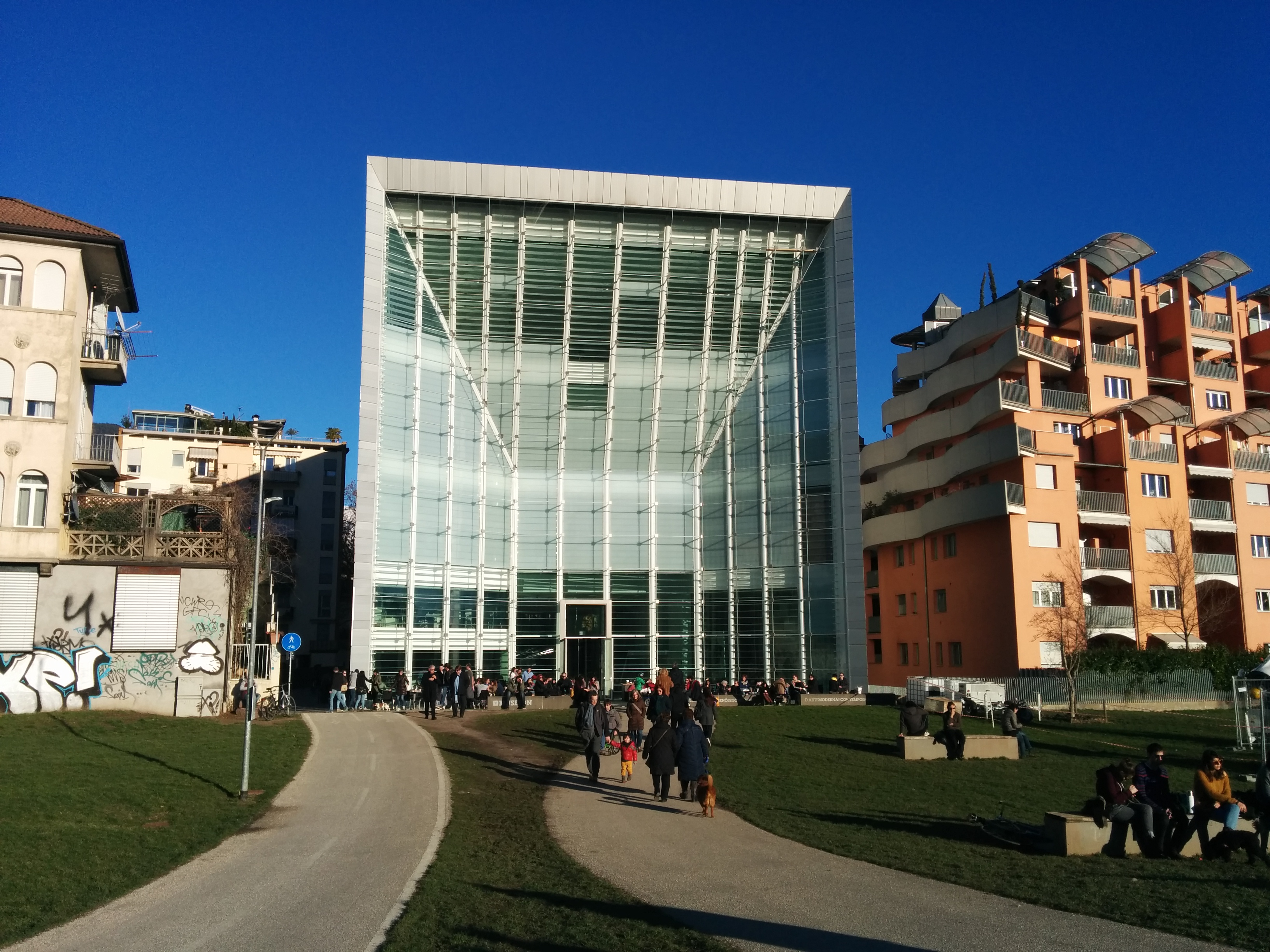 Museion - Museum für moderne Kunst BozenEsperanto: Museion - Muzeo pri moderna arto Bolzano-Bozen